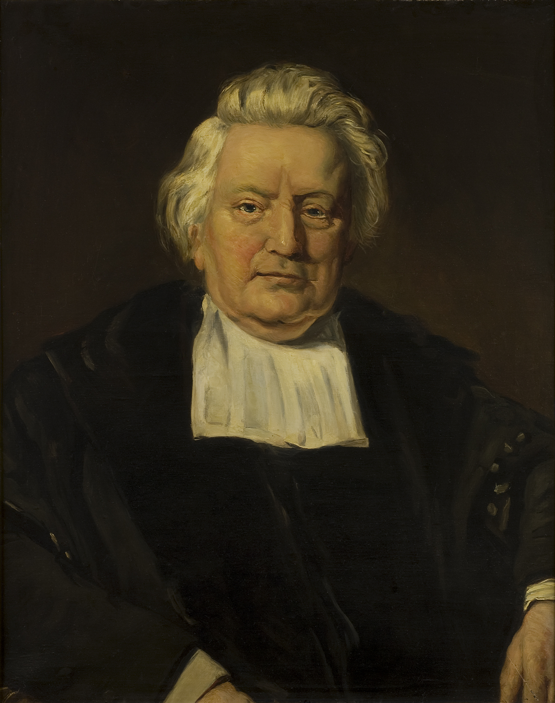 Petrus Hofstede de Groot. ruim borstbeeld, frontaal, aanzien, zittend, de armen rustend op de leuningen. toga, bef; grijs haar. bruine achtergrond.